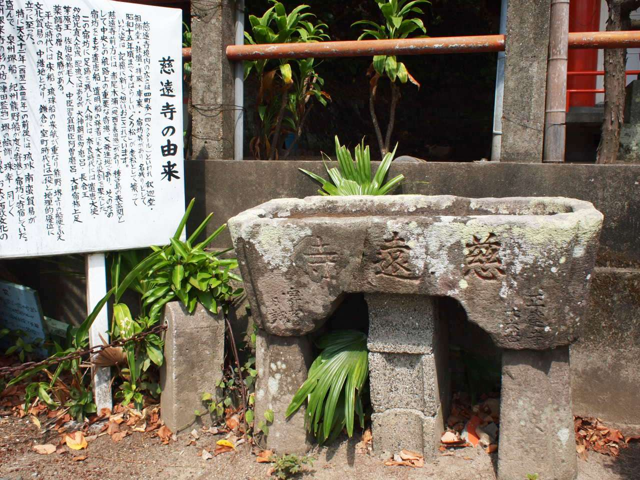 鹿児島県西之表市慈遠寺跡の手水鉢